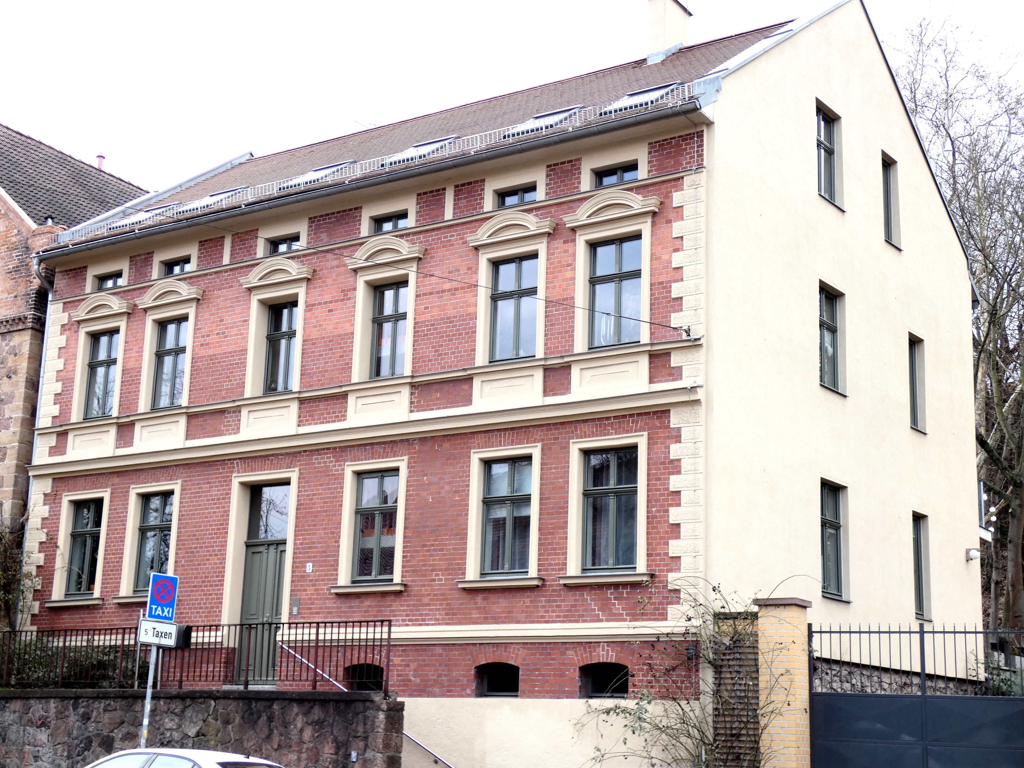 Fährstraße 3, Halle (Saale), zur ehemaligen Brauerei Carl Bauer gehörend